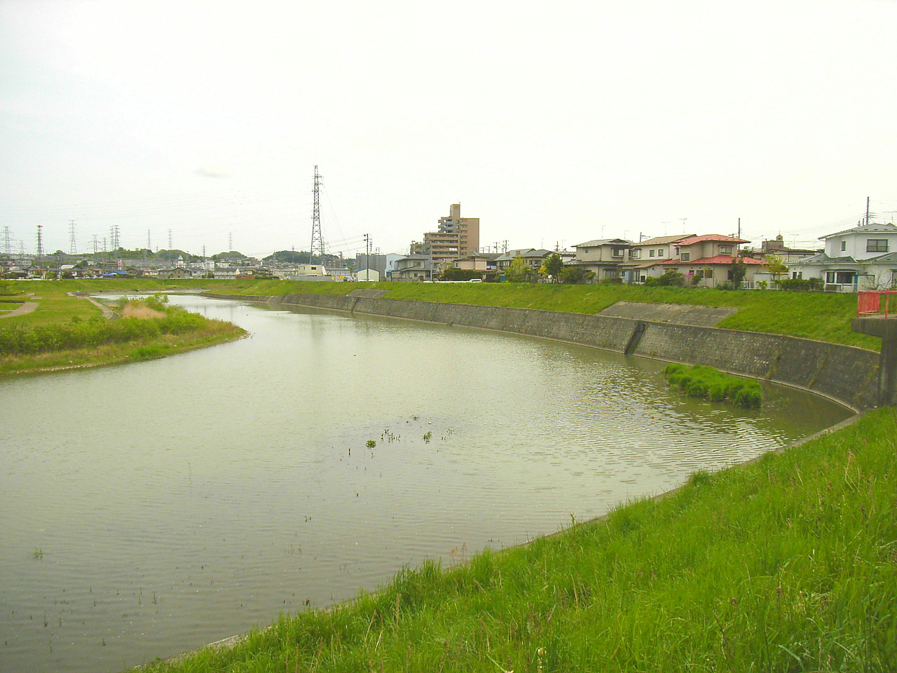 Nanakita River. Sendai, Japan.